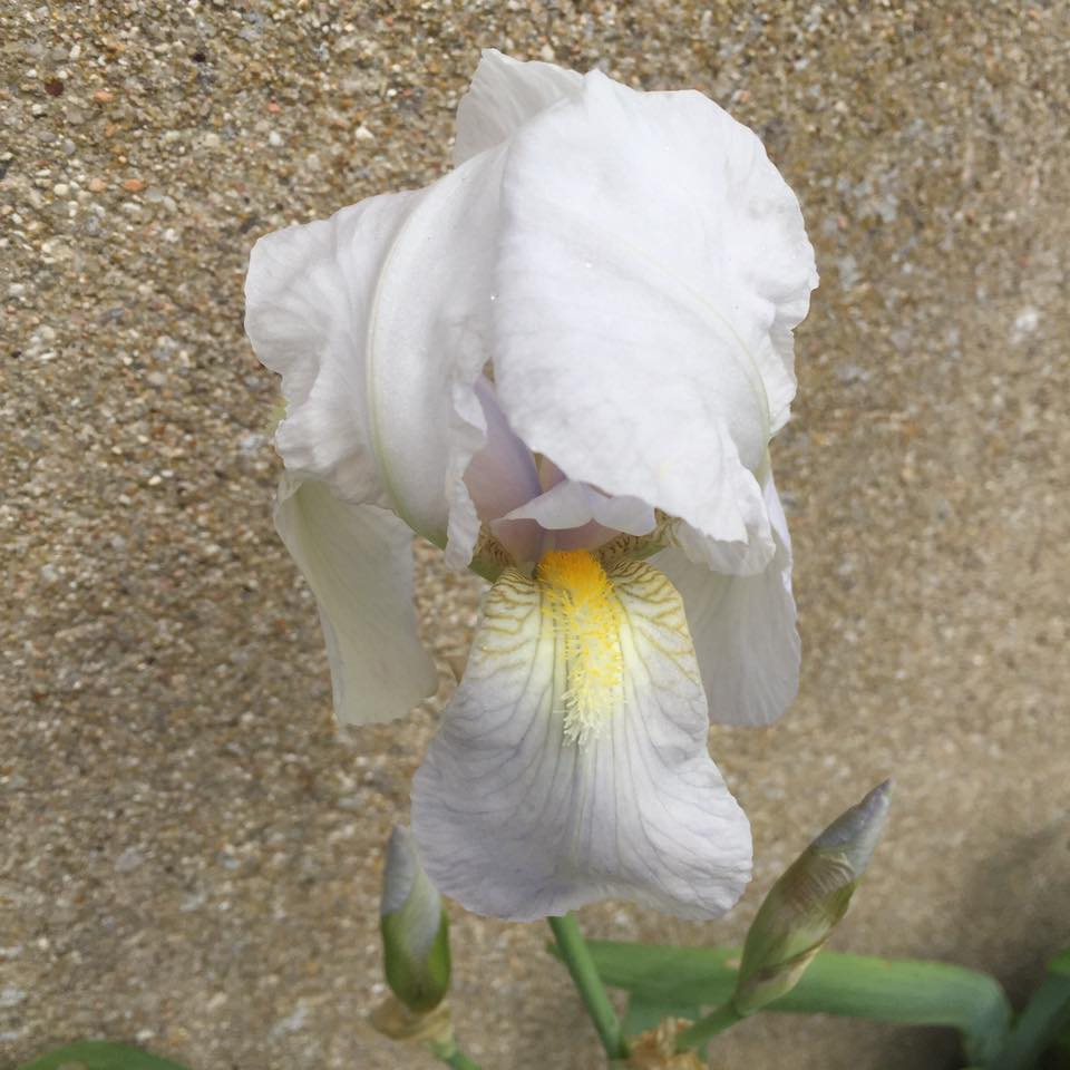 Fleur d'iris florentina